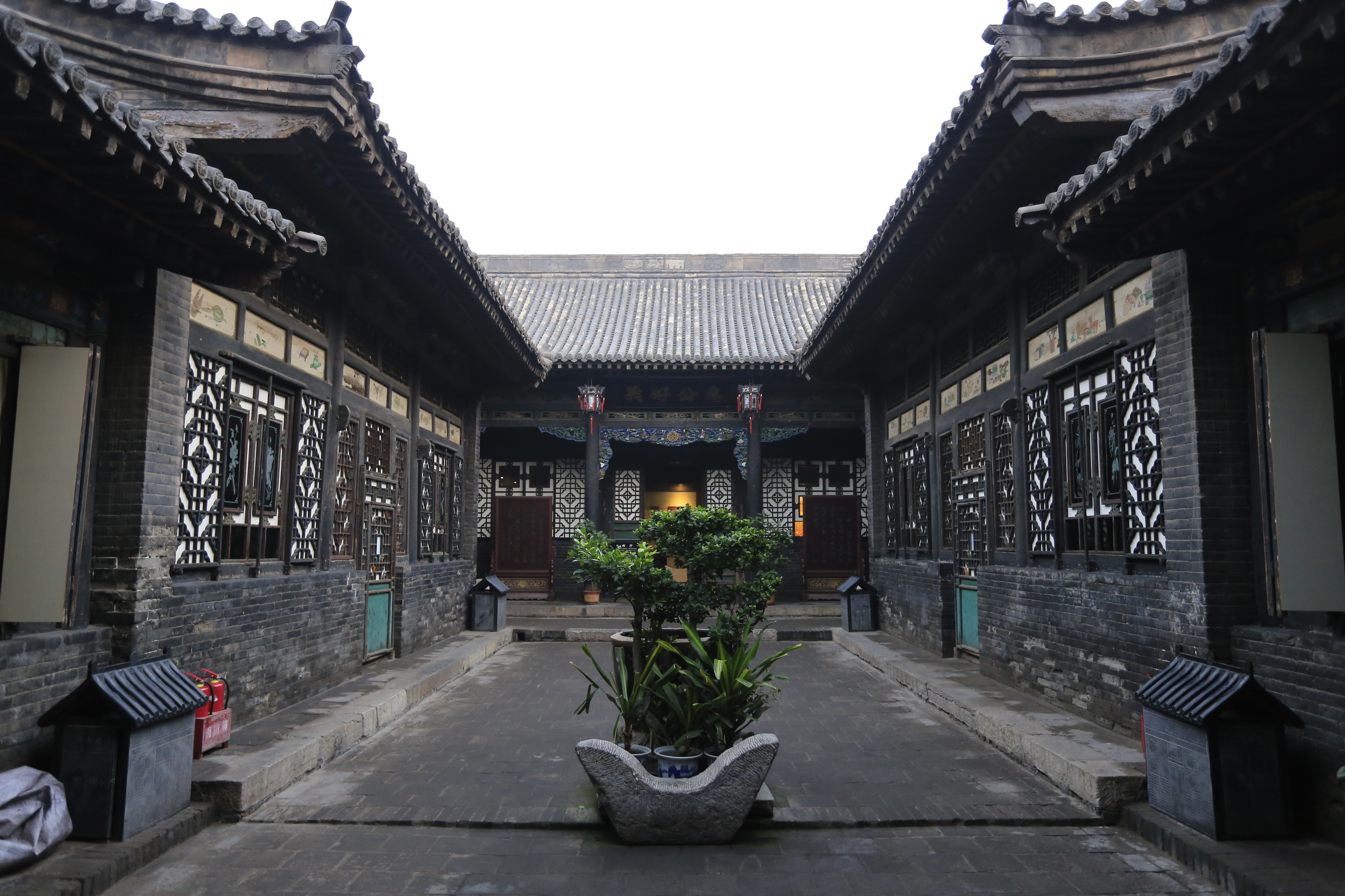 平遥日昇昌舊址 —— “急公好義”